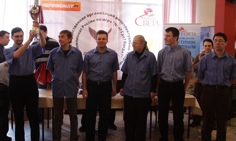 Команда Губанова на церемонии награждения призёров X чемпионата России по «Что? Где? Когда?». 21 февраля 2010 года, МГИМО, Москва.